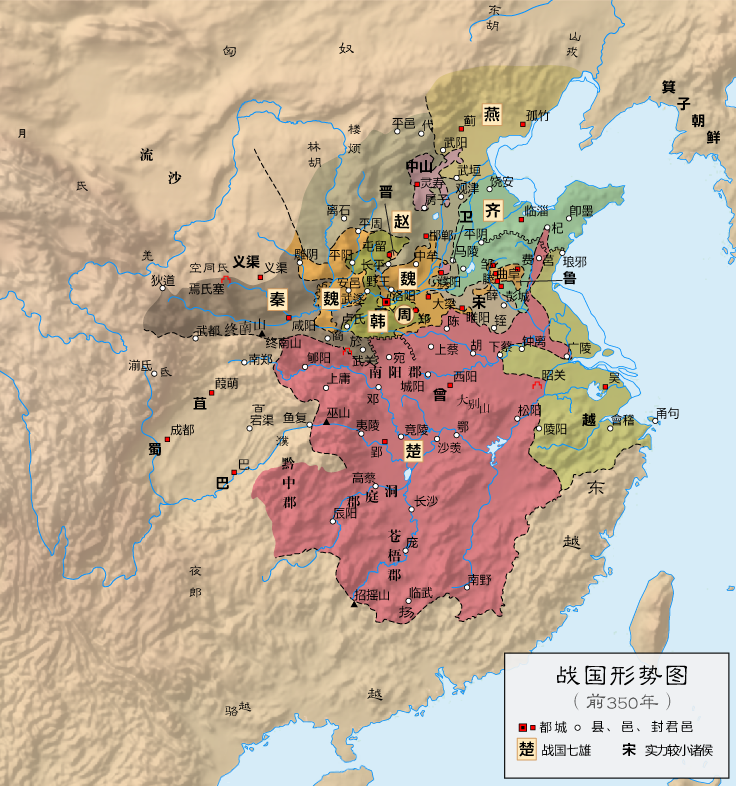 战国